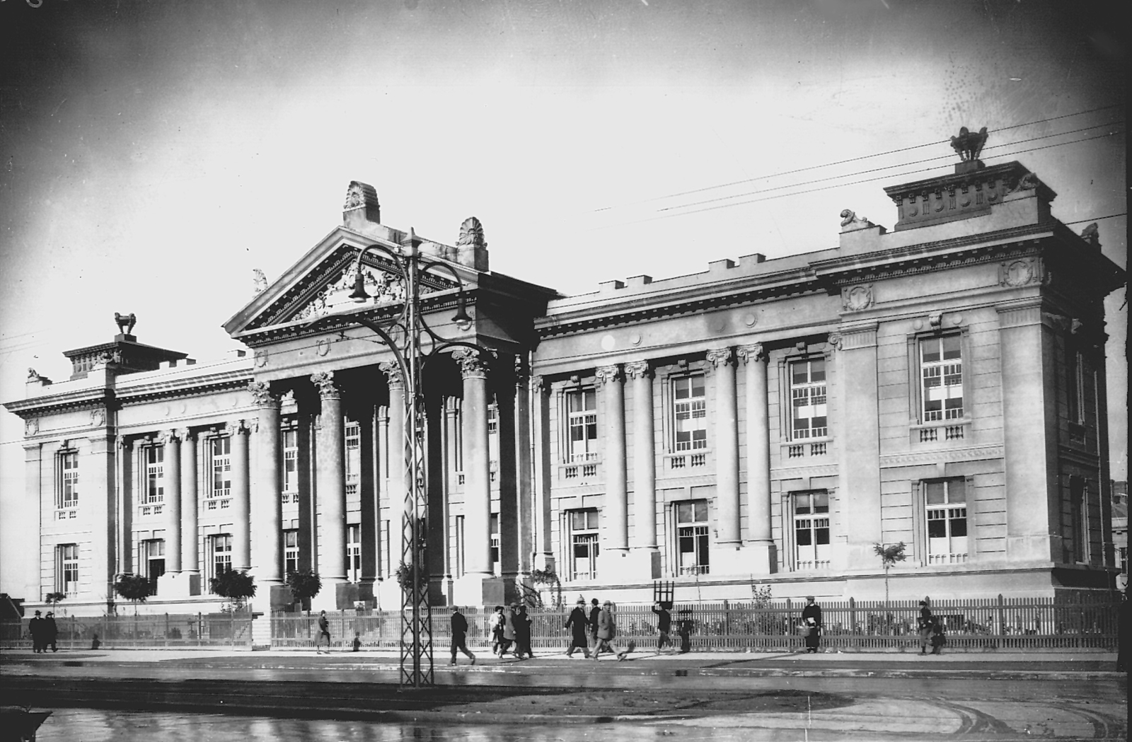 Српски (ћирилица): Библиотека некада